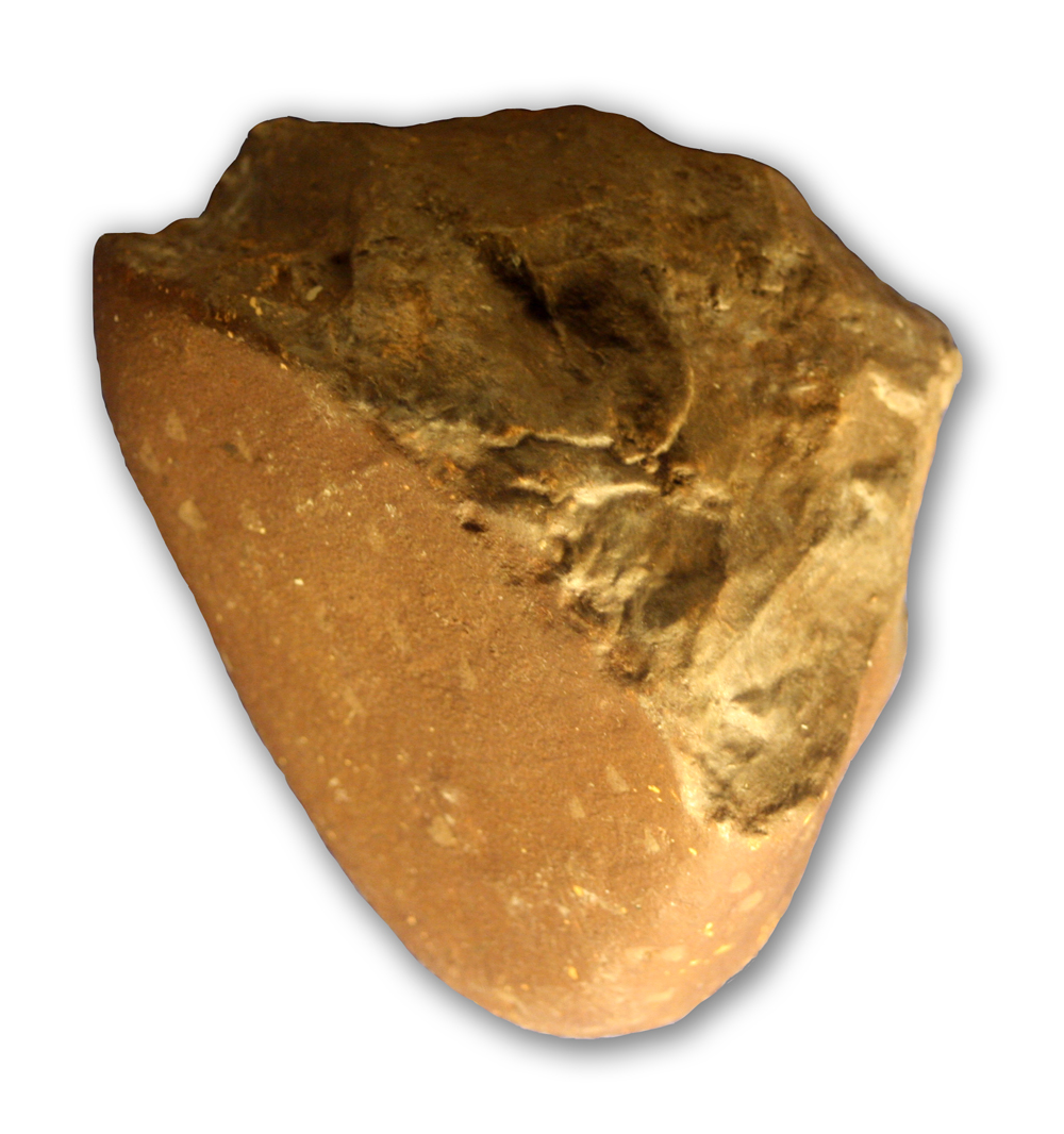 objet de pierre taillée découvert à Hadar en Éthiopie (2,4 à 2,6 Ma) ; moulage présenté dans une vitrine du Musée de l'Homme à Paris